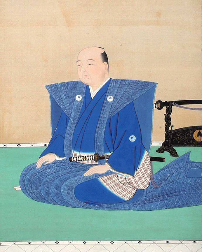 諫早茂洪の肖像。